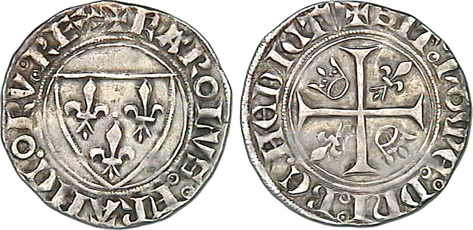 A/ + KAROLVS° FRANC.ORV° REX, (ponctuation par deux annelets pointés superposés). Écu de France. R/ + SIT° n0mE° DnI° BE.NEDICTV, (ponctuation par deux annelets pointés superposés). Croix cantonnée d'une couronnelle aux 1 et 4, d'un lis aux 2 et 3 11/09/1389